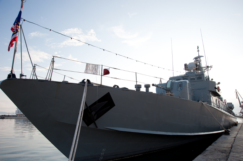 Dan HRM-a, Rijeka